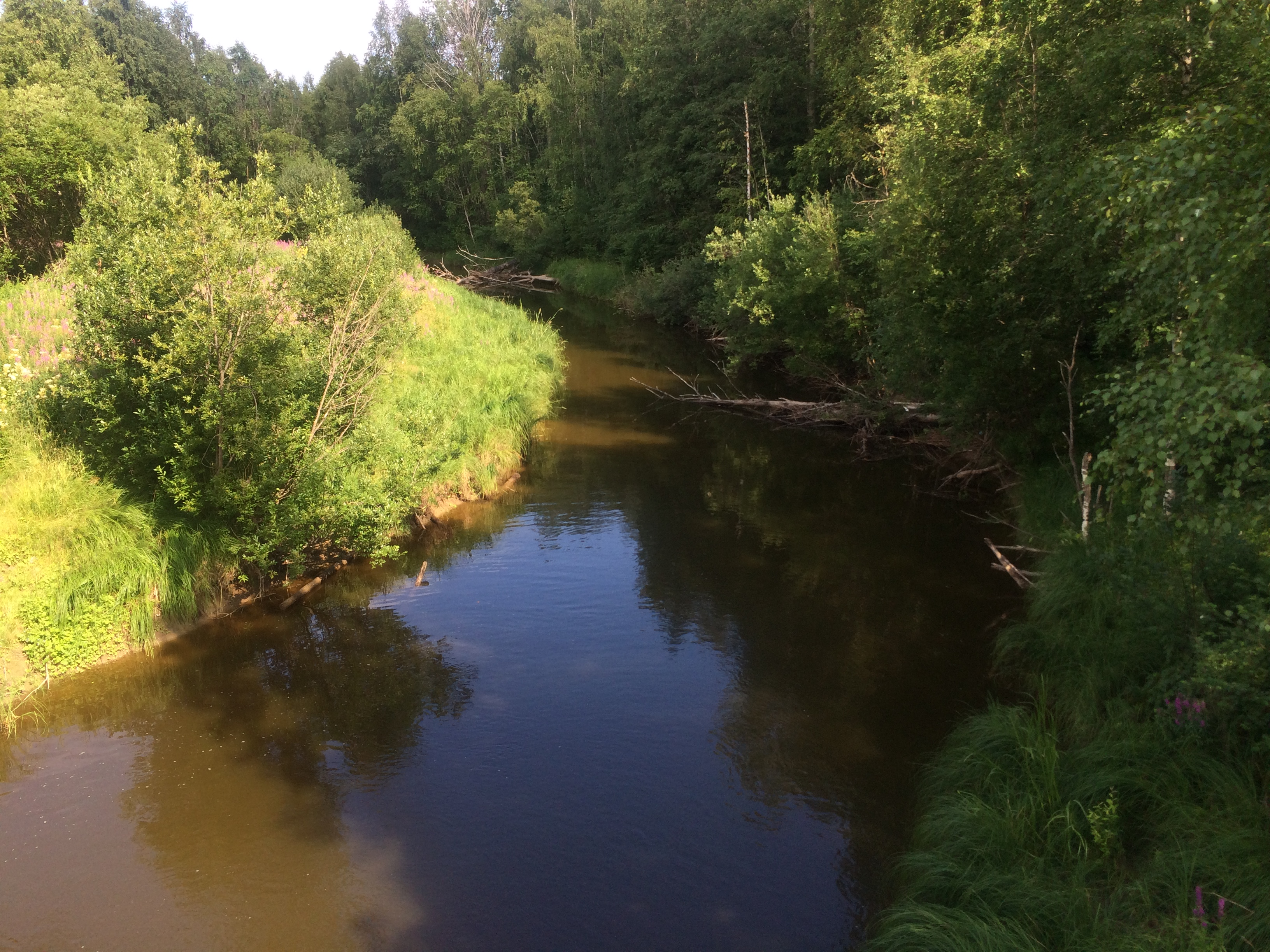 Нива (река, впадает в Сундозеро)